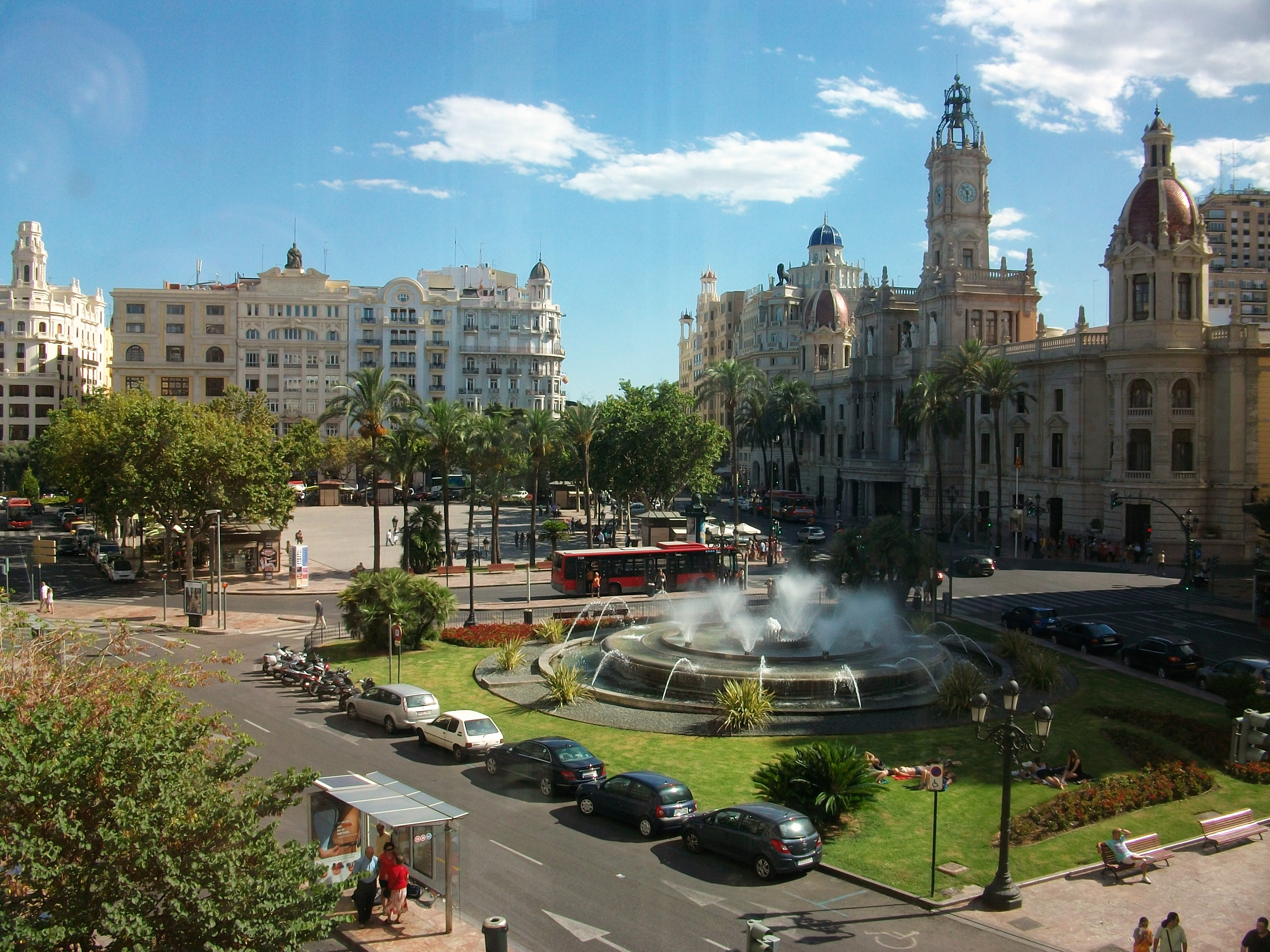 Plaça de l'Ajuntament de València, País Valencià.